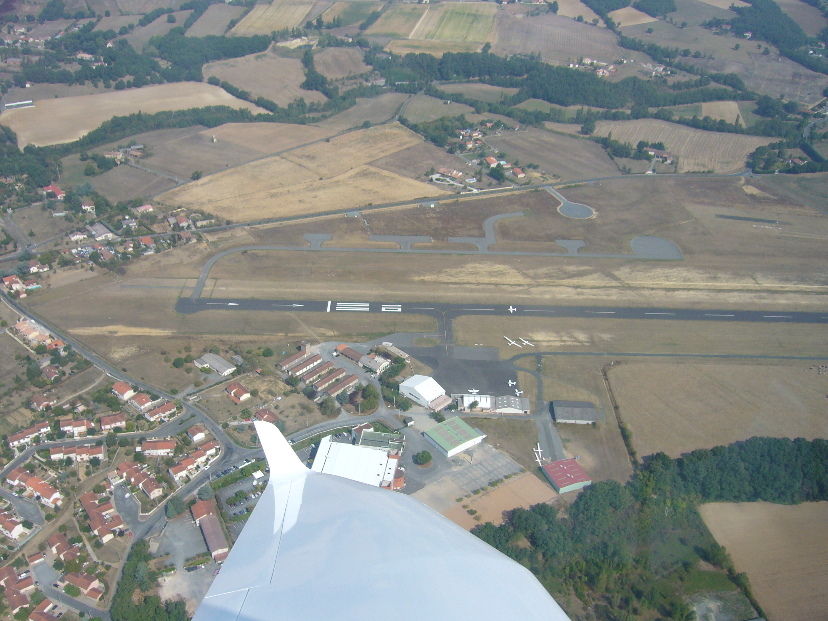 Description Vol en Aquila AT01, intégration en début de Vent Arrière de la piste 28 de Graulhet. Date12/09/09SourcePhotographie prise en vol, par l'auteur.AuthorRenaud Schlosser Catégorie:Avion Vol en Aquila AT01, intégration en début de Vent Arrière de la piste 28 de Graulhet.